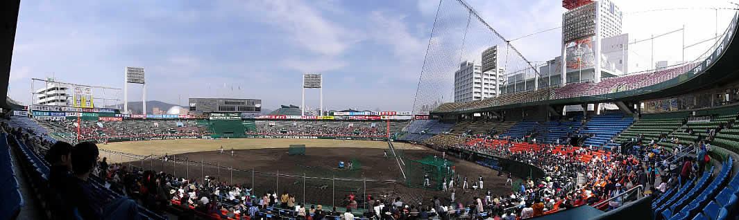 広島市民球場2004年03月14日(広島対福岡ダイエー)。投稿者により撮影されました。 2005年8月6日 (土) 23:03 . . Gomurafuji . . 1065×318 (72,796 バイト)